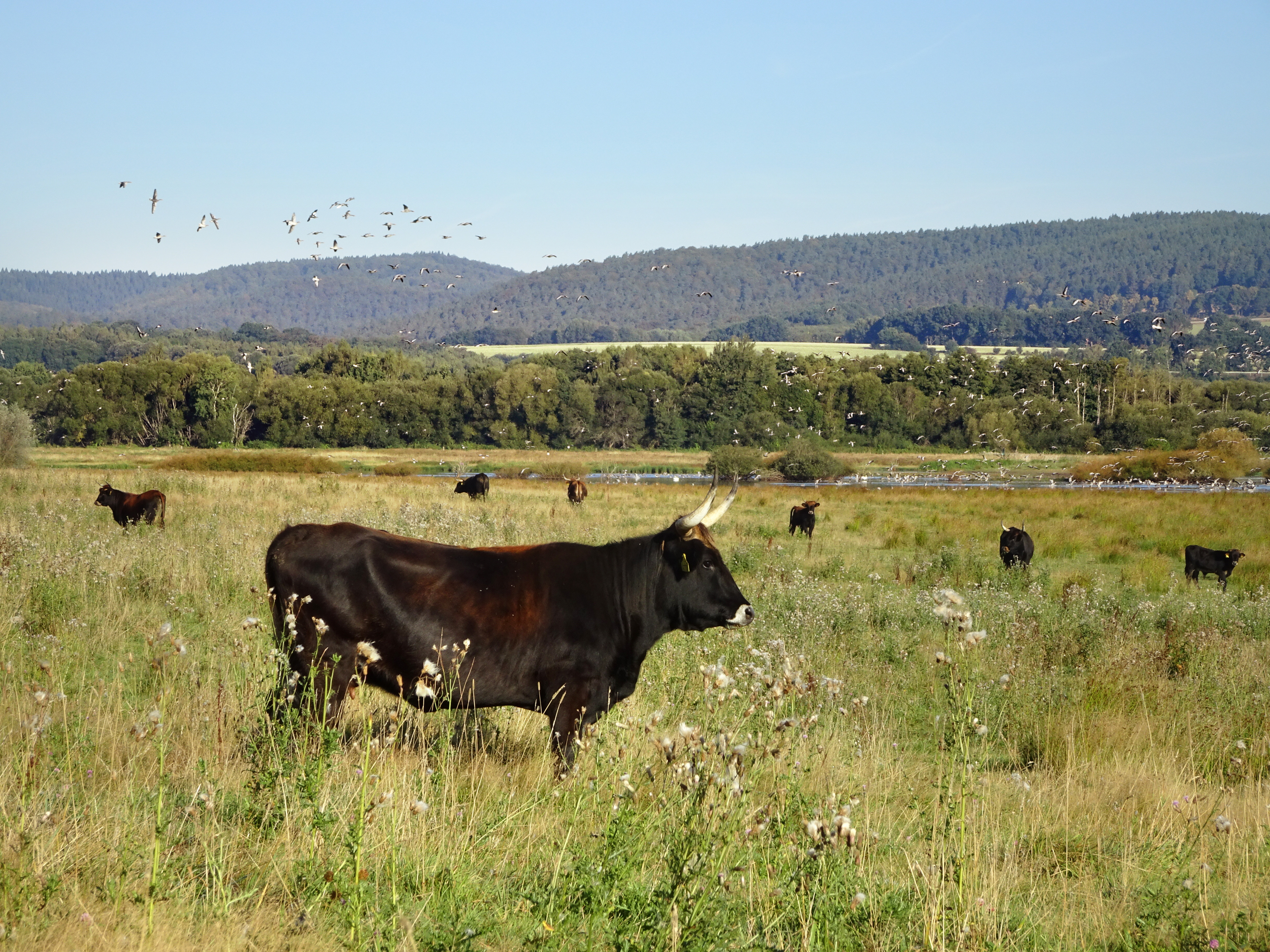 Heckrinder und Graugänse (Anser anser) im Naturschutzgebiet „Dankmarshäuser Rhäden“ im thüringischen Wartburgkreis. Der Bereich gehört auch zum FFH-Gebiet DE-5026-305 „Dankmarshäuser Rhäden“ und zum EU-Vogelschutzgebiet DE-5127-401 „Werra-Aue zwischen Breitungen und Creuzburg“. Die „Wilden Weiden“ sind ein Projekt im Dankmarshäuser Rhäden, zu dessen Verwirklichung Stiftung Naturschutz Thüringen, NABU Thüringen, Agrargenossenschaft, Gemeinde und Verein für Naturschutz und Landschaftspflege Dankmarshausen, Thüringer Landesanstalt für Umwelt und Geologie, Landesentwicklungsgesellschaft und Untere Naturschutzbehörde Wartburgkreis beigetragen haben. Exmoorponys und Taurusrinder beweiden seit 2015 den Rhäden. Sie sollen die natürliche Strukturvielfalt des großen Feuchtgebietes bereichern und dazu beitragen die Artenvielfalt dieses Schutzgebietes zu erhalten. Der Freistaat Thüringen hat mit Fördermitteln der EU (ELER) dieses Projekt ermöglicht.